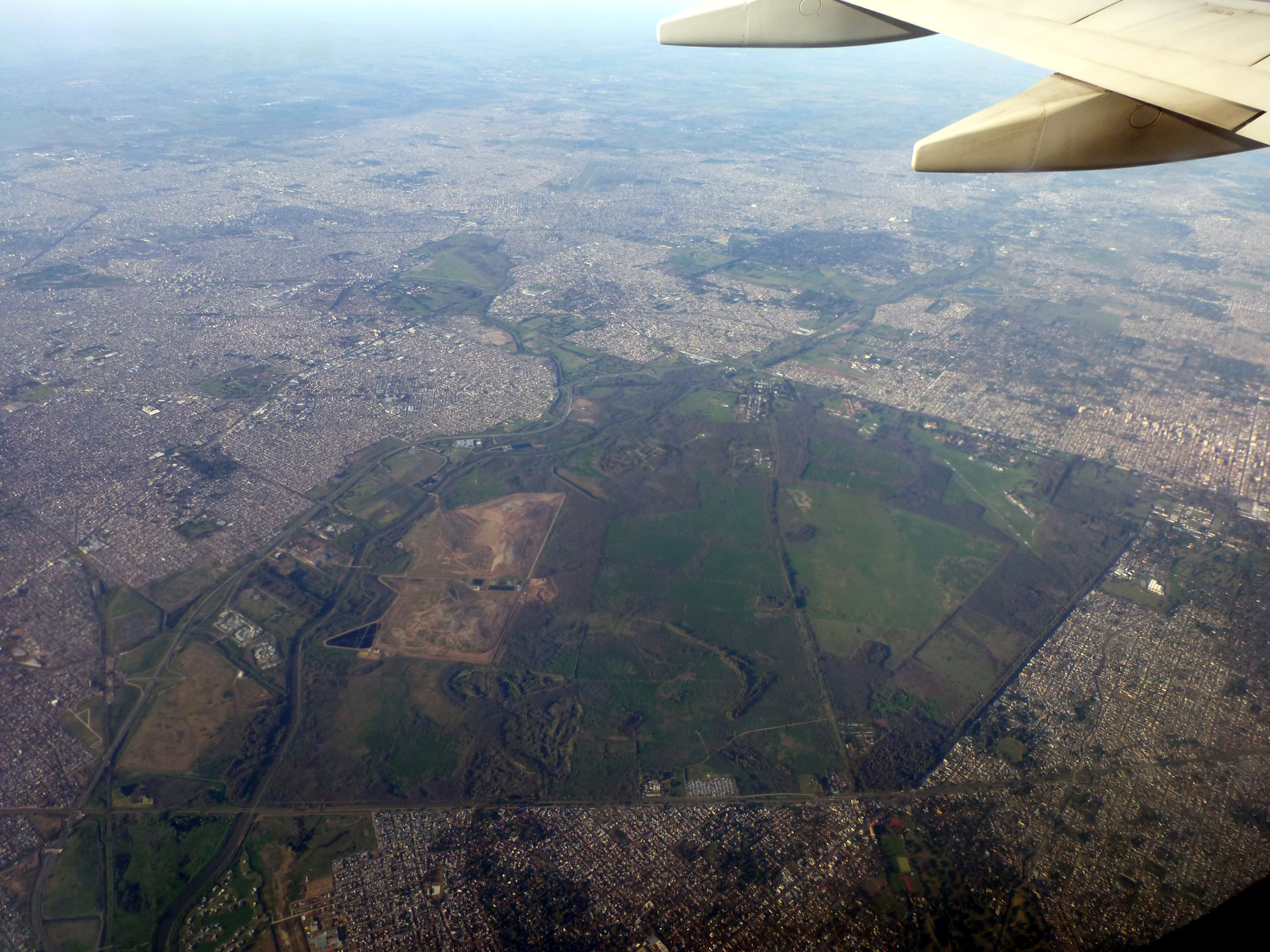 Campo de Mayo en la provincia de Buenos Aires tomada desde un avión.